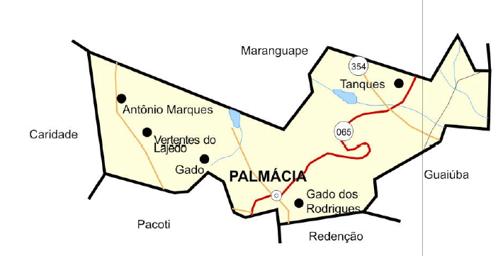 Mapa da cidade de Palmácia-CE